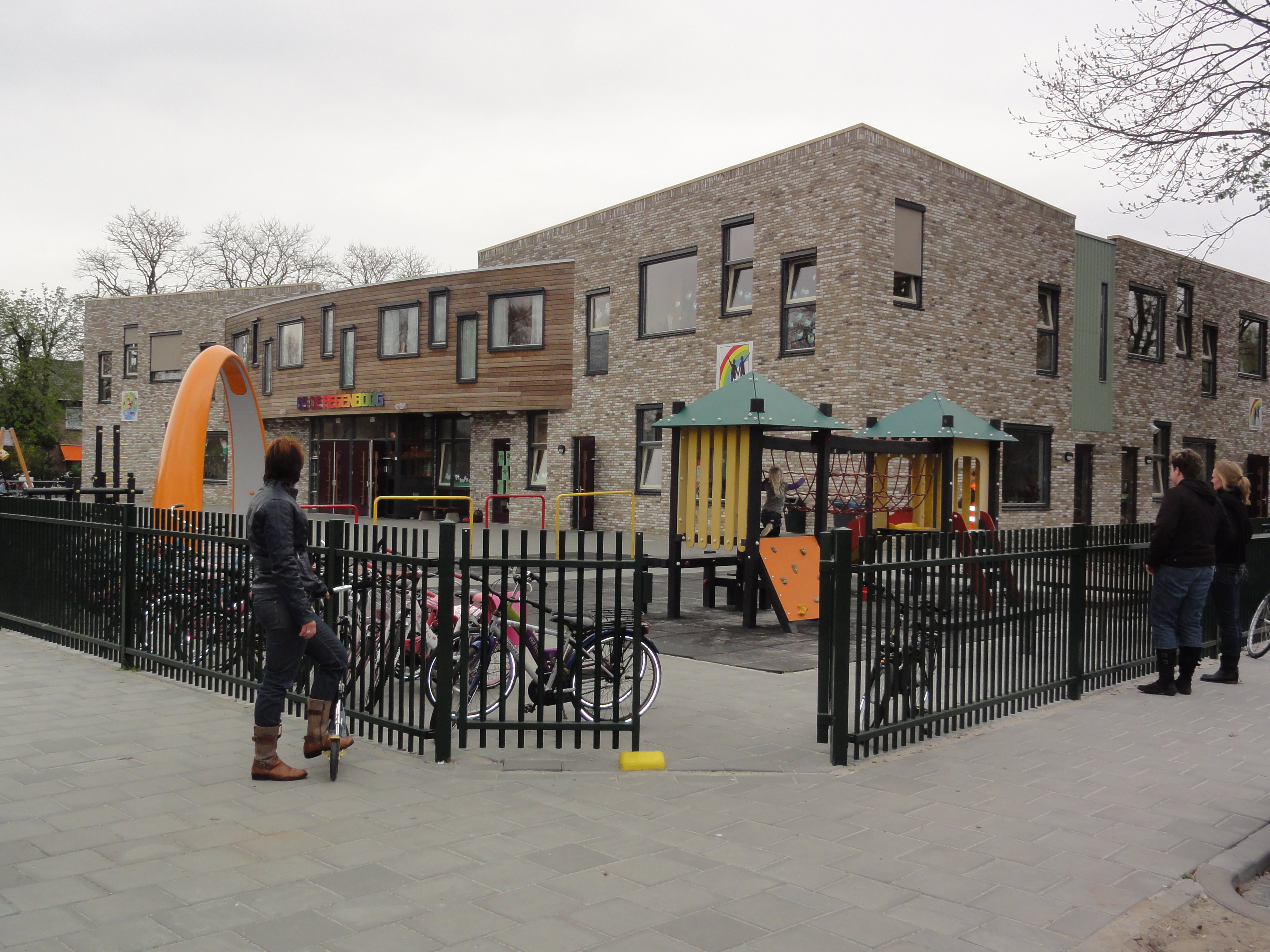 Schaijk (Landerd) basissschool De Regenboog, gebouwd 2010